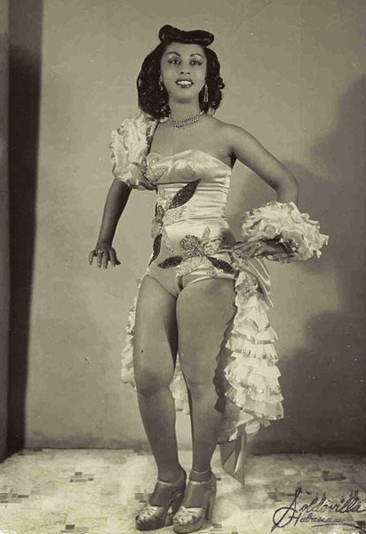 Merceditas Valdés, 1950s